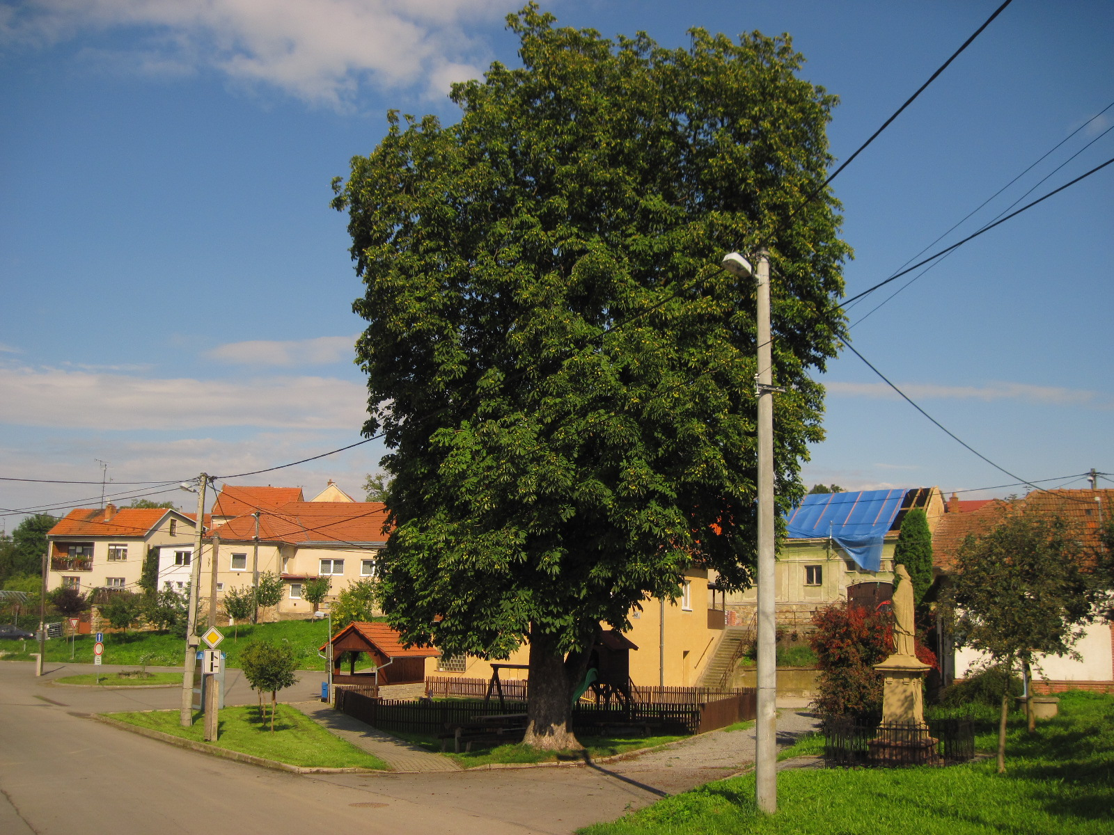 Heroltice u Tišnova - náves